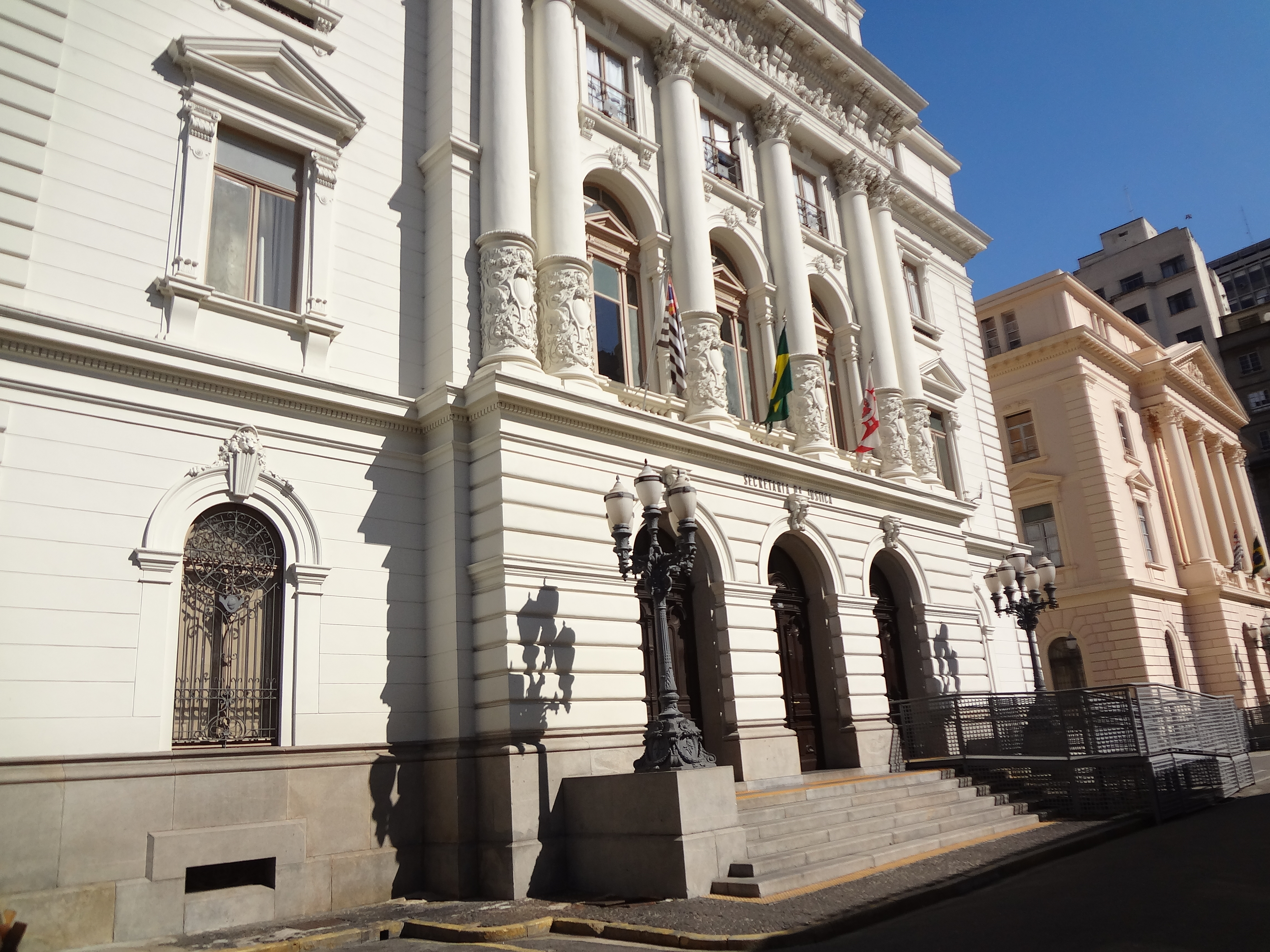 Fachada do antigo edifício um da Secretaria da Agricultura e da Fazenda, atual Secretaria da Justiça, com acesso para cadeirantes.